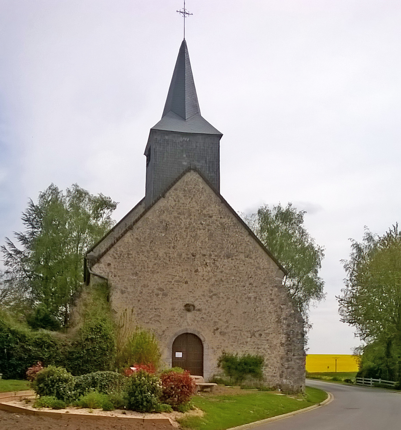 Dédié au culte de Saint Antoine et lieu de pélerinage , elle change de nom au XVIIème siècle et devient l'église des Saints Innocents.